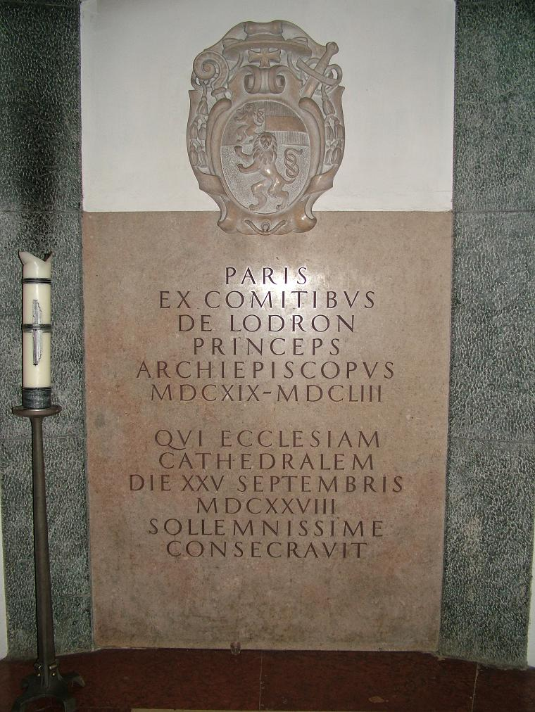 Grab Erzbischof Lodron in Salzburg